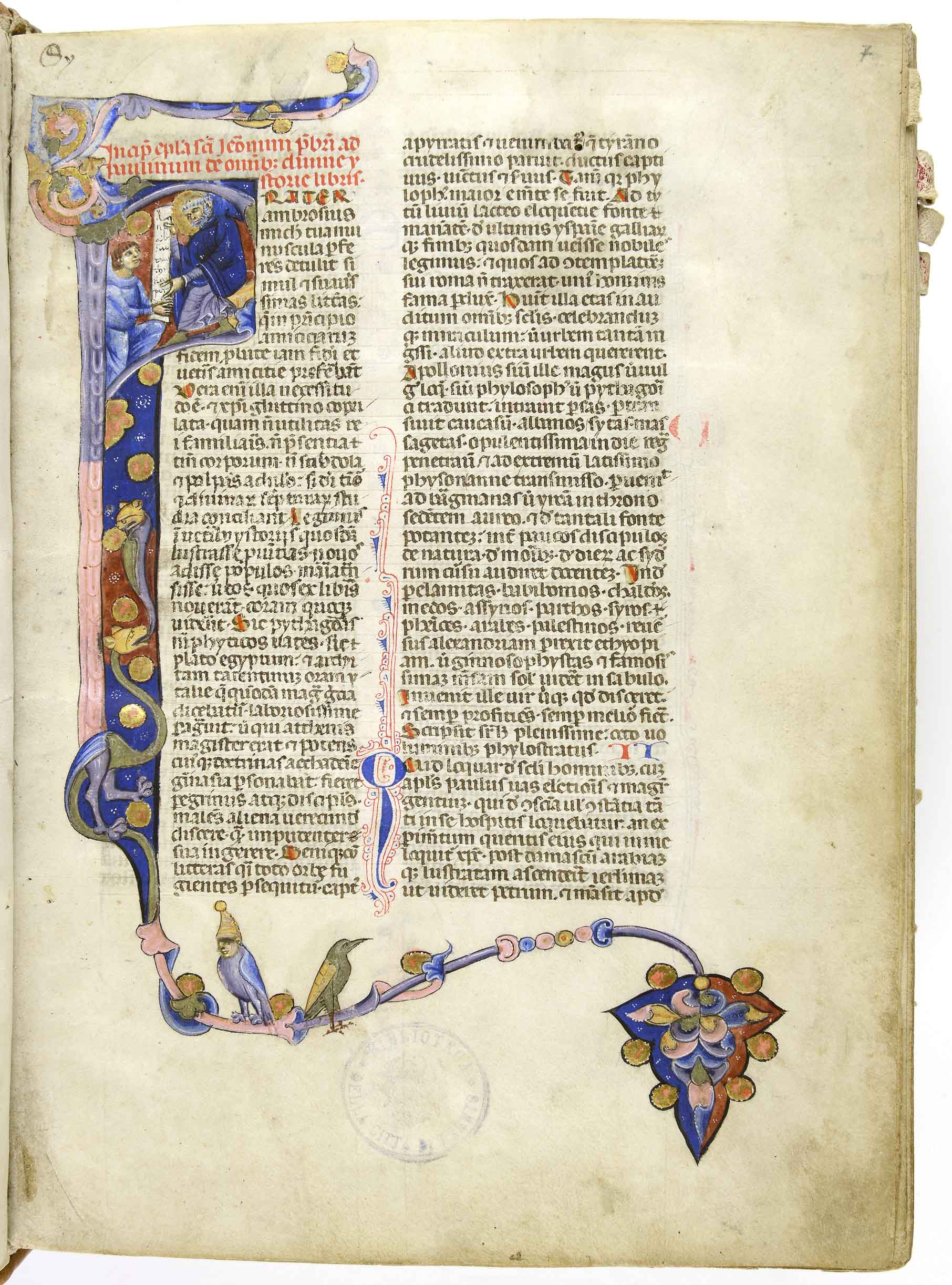 Biblia sacra.